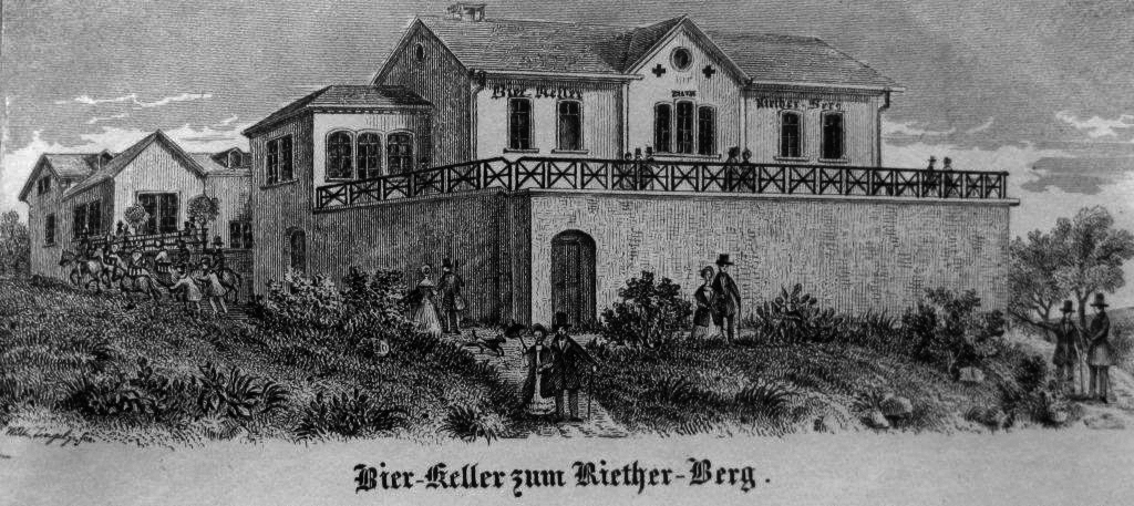 Riederberg-Restauration: Die Wirthschafts-Gebäude von Chr. Bücher in Wiesbaden, Bierkeller zum Riether-Berg 1854